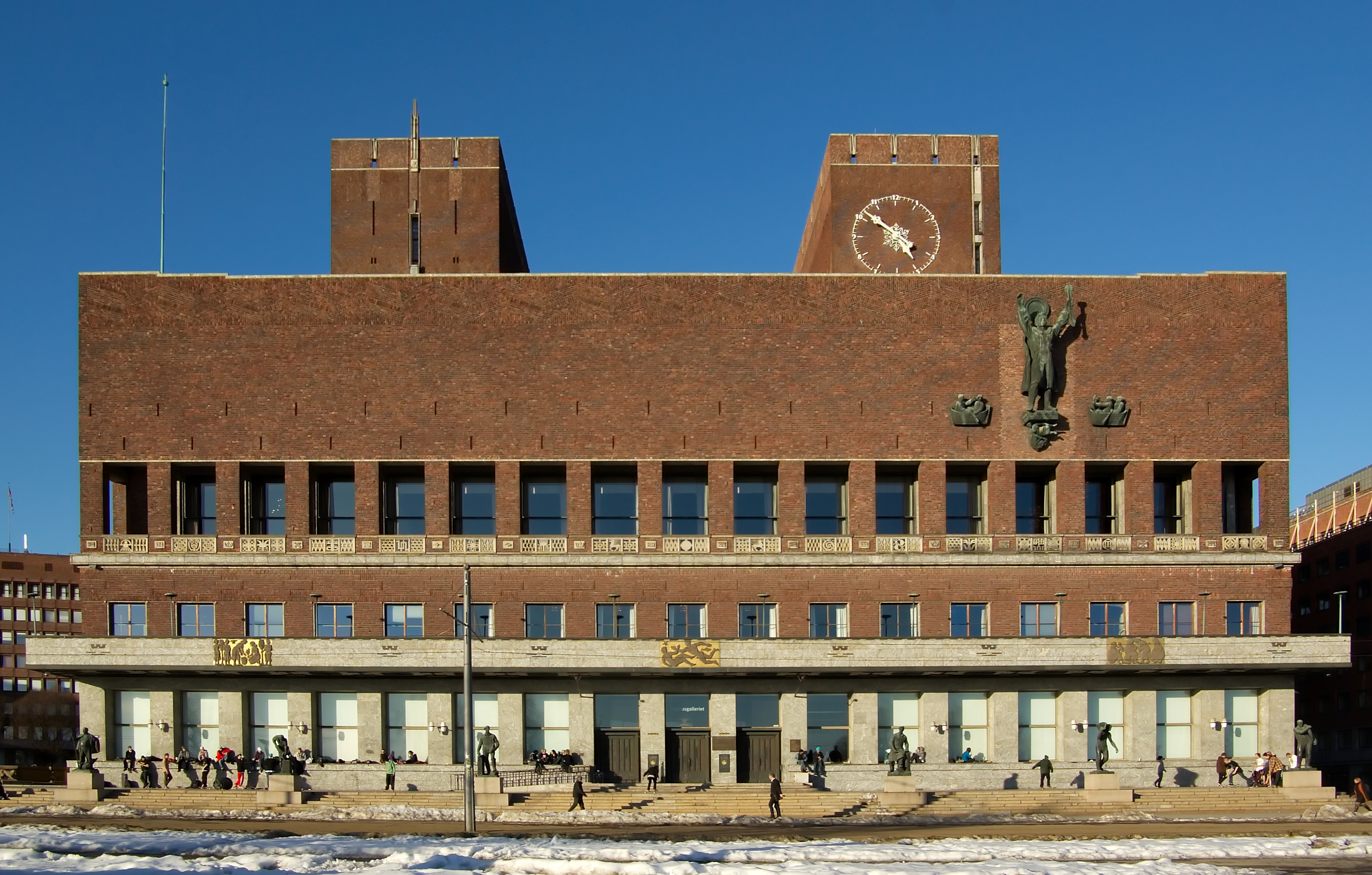 Oslo rådhus